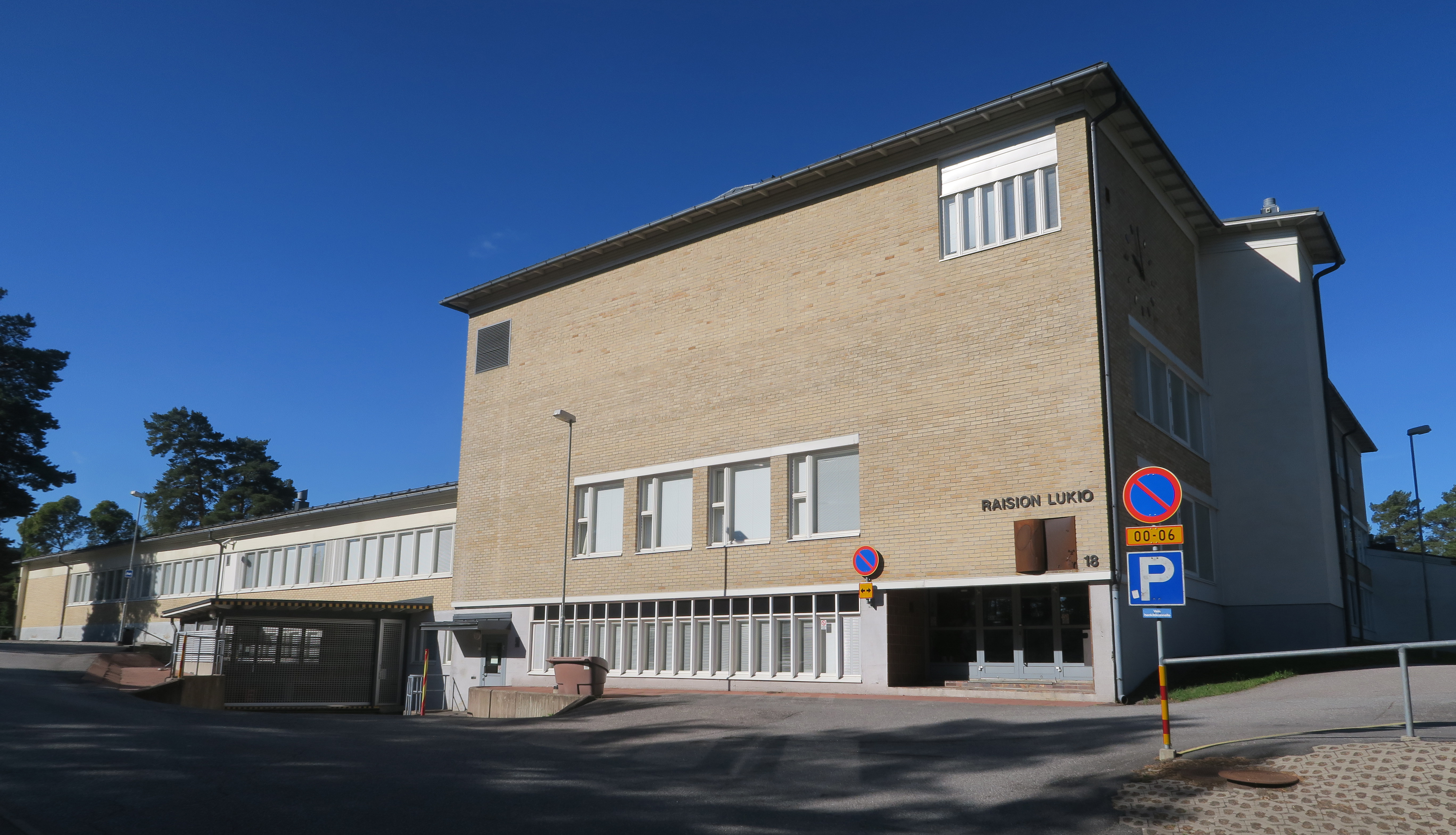 Raision lukio Kirkkoväärtinkatu 18 Raisio